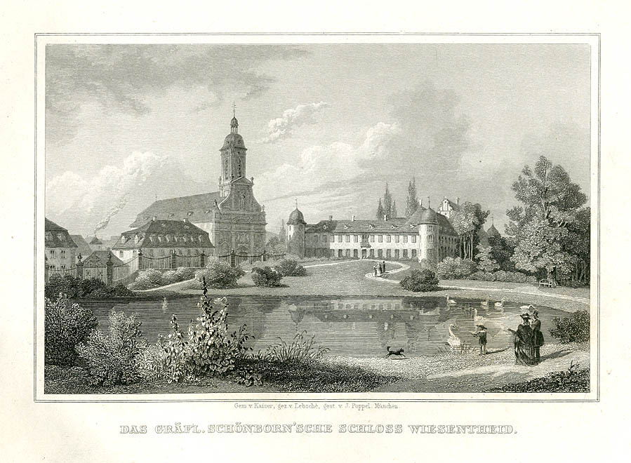 Das Gräfl. Schönborn’sche Schloß Wiesentheid, Stahlstich, um 1879/1881 aus: Das Königreich Bayern. Seine Denkwürdigkeiten und Schönheiten, München, 1879/1881